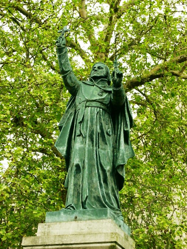 Eigen foto. Paul Hermans 8 mei 2004 20:22 (CEST)